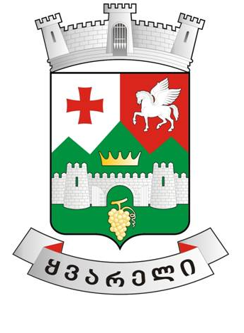 ყვარლის მუნიციპალიტეტის გერბი